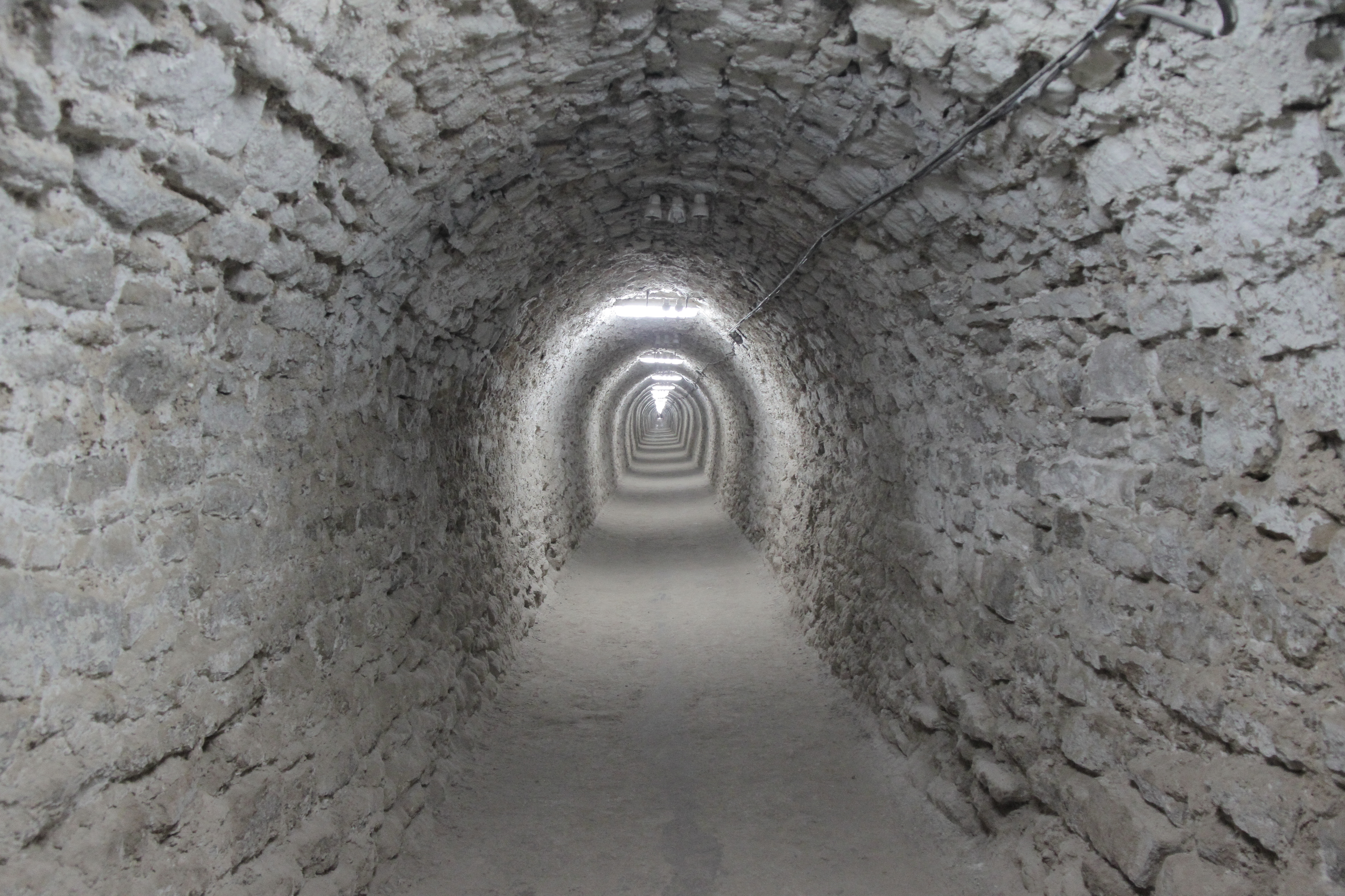 Salina Turda, galeria de acces Franz-Josef (porţiunea săpată în steril, in afara masivului de sare).